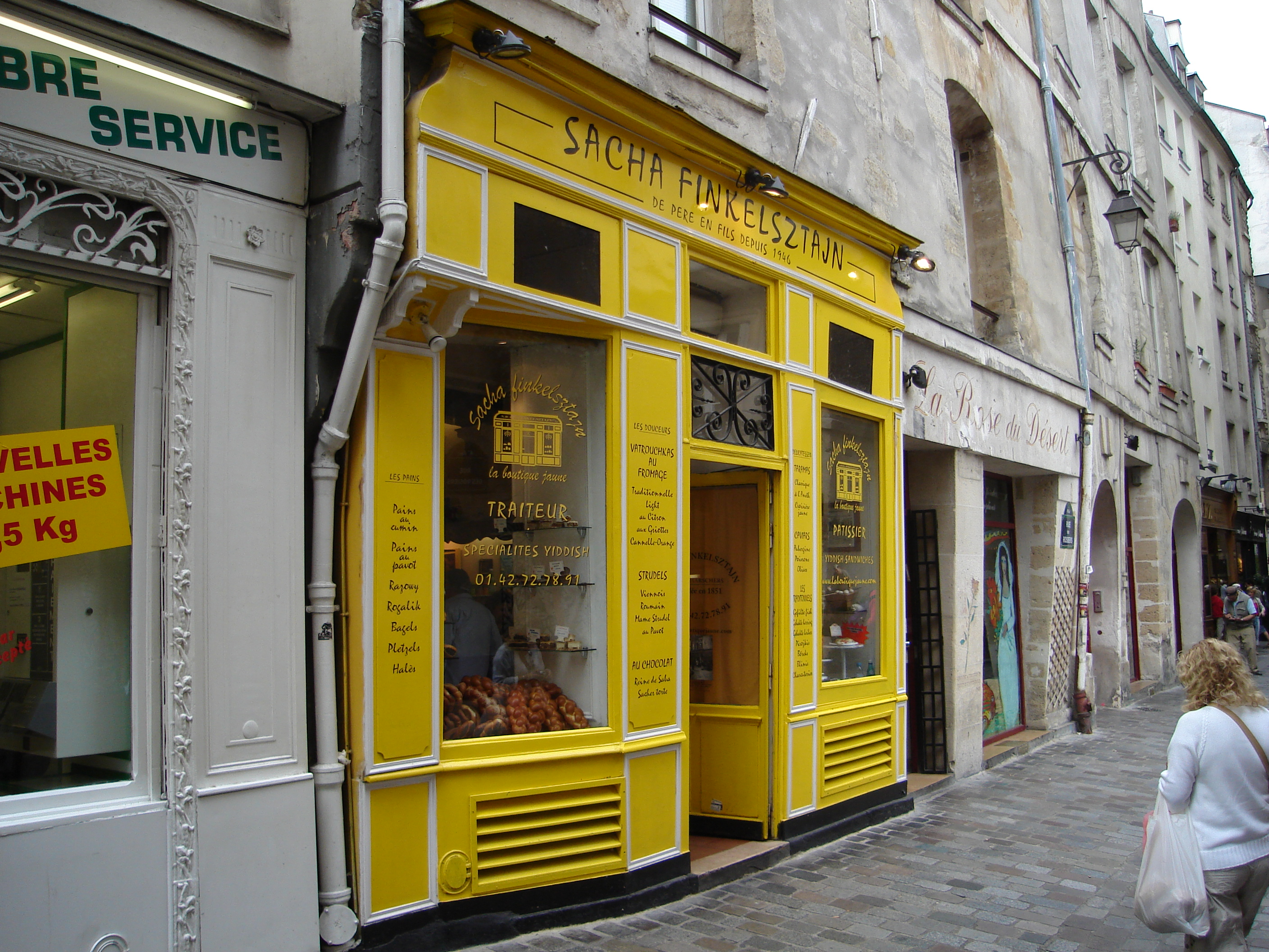 RUE DES ROSIERS